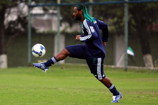 Vágner Love - Treinamento do Palmeiras em 2009